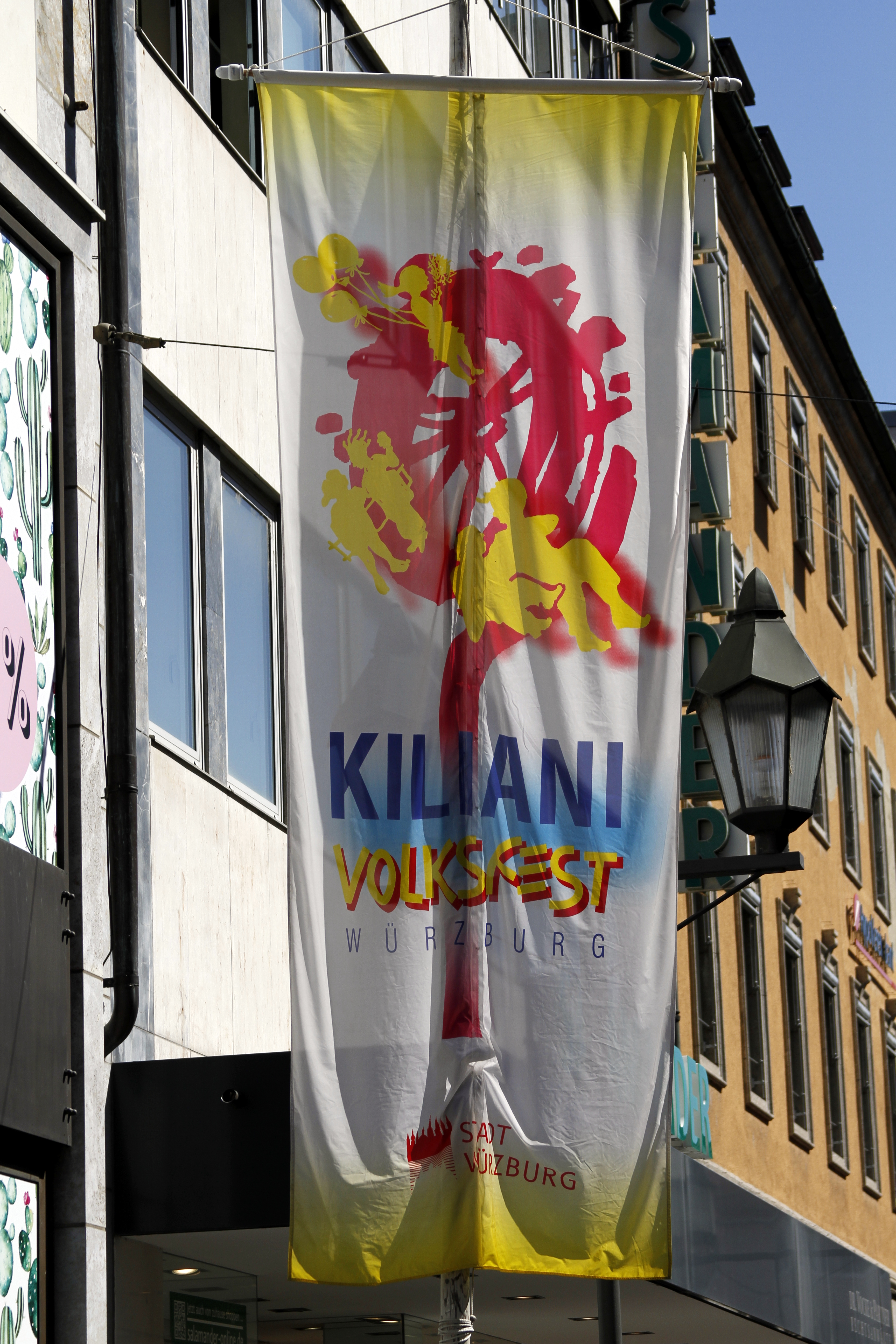 Domstraße - Würzburg - Germany